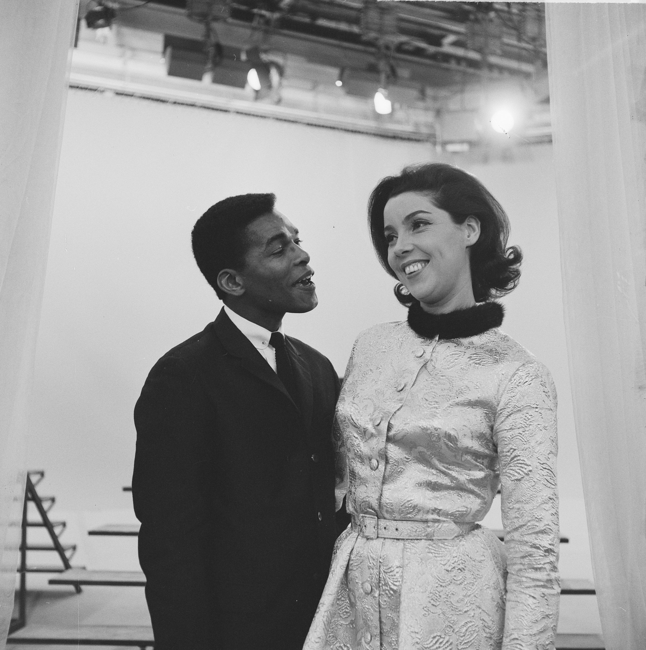 Collectie / Archief : Fotocollectie Anefo Reportage / Serie : [ onbekend ] Beschrijving : De Corry Brokken show VARA-TV-uitzending 1 december. Corry Brokken samen met Donald Jones Datum : 27 november 1963 Persoonsnaam : Brokken, Corry, Jones, Donald Fotograaf : Broers, F.N. / Anefo Auteursrechthebbende : Nationaal Archief Materiaalsoort : Negatief (zwart/wit) Nummer archiefinventaris : bekijk toegang 2.24.01.03 Bestanddeelnummer : 915-7865